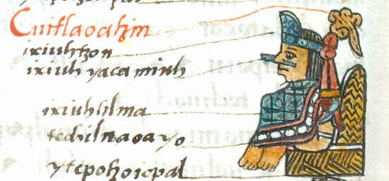 Cuitláhuac, señor de Itztapalapan y penúltimo tlatoani mexica, según un códice de las primeras épocas posteriores a la conquista de México.